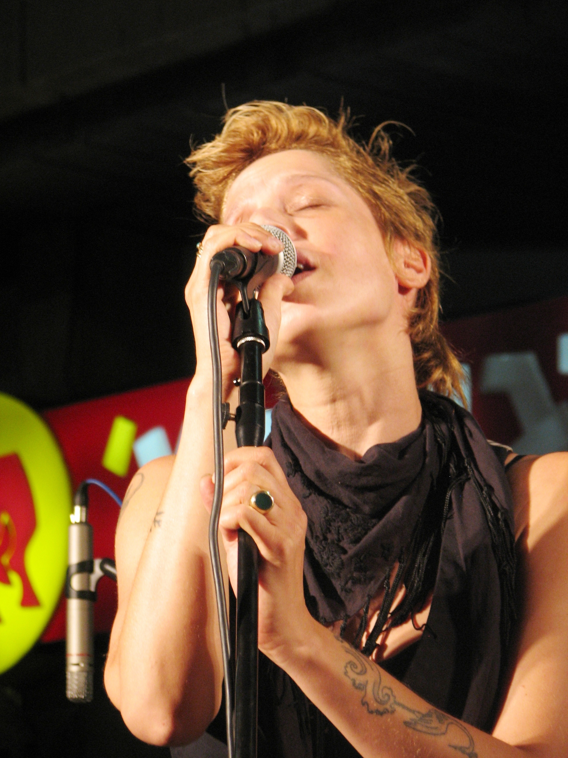 The 2011 housing protests in Israel, are a series of ongoing street demonstrations taking place throughout Israel from 14 July 2011 onwards. Protests in Haifa On the evening of the July 30, 2011, 11,000 demonstrators participated in a protest rally held in the center of Haifa. The demonstration included a mass march, which began at around 20:30, at the Isac park to the Horev Square, where the main rally was held. מחאת הדיור היא הכינוי לסדרת הפגנות המתקיימות ברחבי ישראל מה-14 ביולי 2011 ואילך. במוצאי שבת התקיימו הפגנות שונות ברחבי ישראל כאשר לפחות 150 אלף בני אדם יצאו לרחובות כדי להפגין נגד המדיניות החברתית של ממשלת נתניהו וקראו קריאות בגנות הממשלה ובעד צדק חברתי.הפגנות התקיימו בין היתר בחיפה, ירושלים, בבאר שבע, בכפר סבא ורעננה, בבאקה אל-גרבייה ובצומת סביון, באשדוד ונתניה, קרית שמונה, טבריה ועמק הירדן. ההפגנה בחיפה, החלה בכינוס בגן יצחק שבפינת רחובות מאפו ושדרות מוריה בשכונת אחוזה, בשעה 20:30 לערך, מכן התקיימה תהלוכה עד כיכר חורב שם הוקמה במה נישאו נאומים שונים ומופעים. הקריאה המרכזית בהפגנה הייתה "העם דורש צדק חברתי". ההפגנה התפזרה בשעה 22:45 לערך. על פי הערכת משטרת חיפה, בהפגנה השתתפו כ-11,000 איש הזמרת מיקה קרני, נשאה דברים ושרה בהפגנה